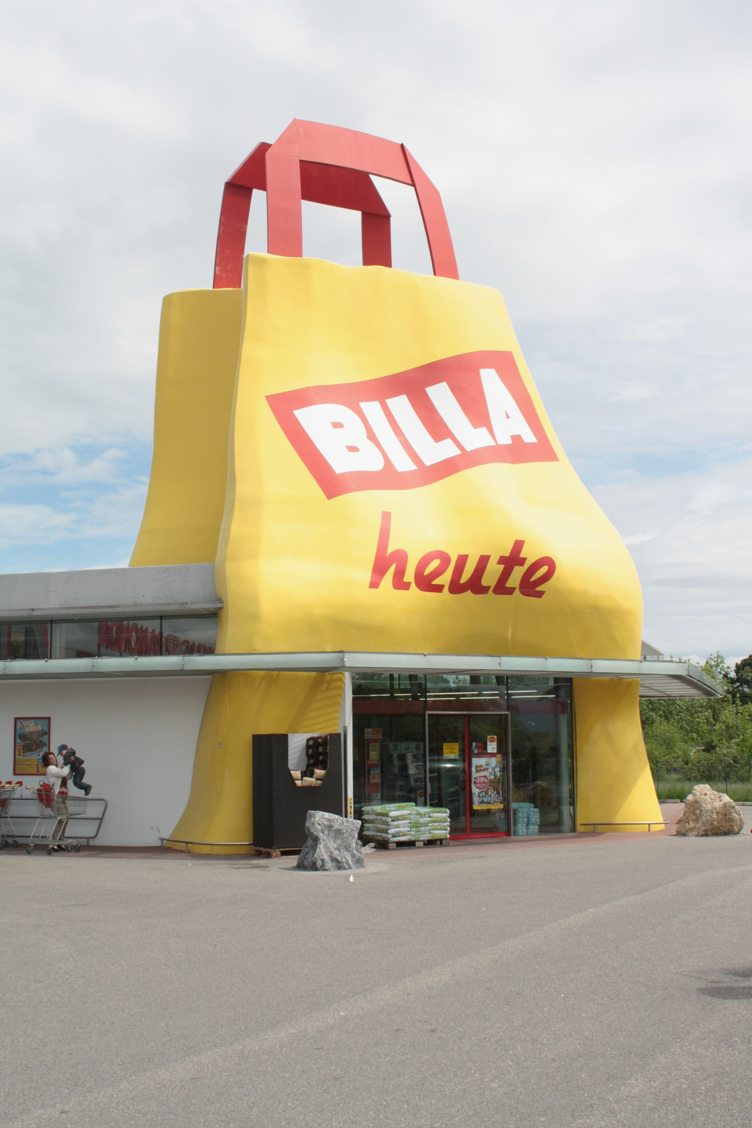 Filiale der Supermarktkette BILLA in Wöllersdorf-Steinabrückl in Niederösterreich